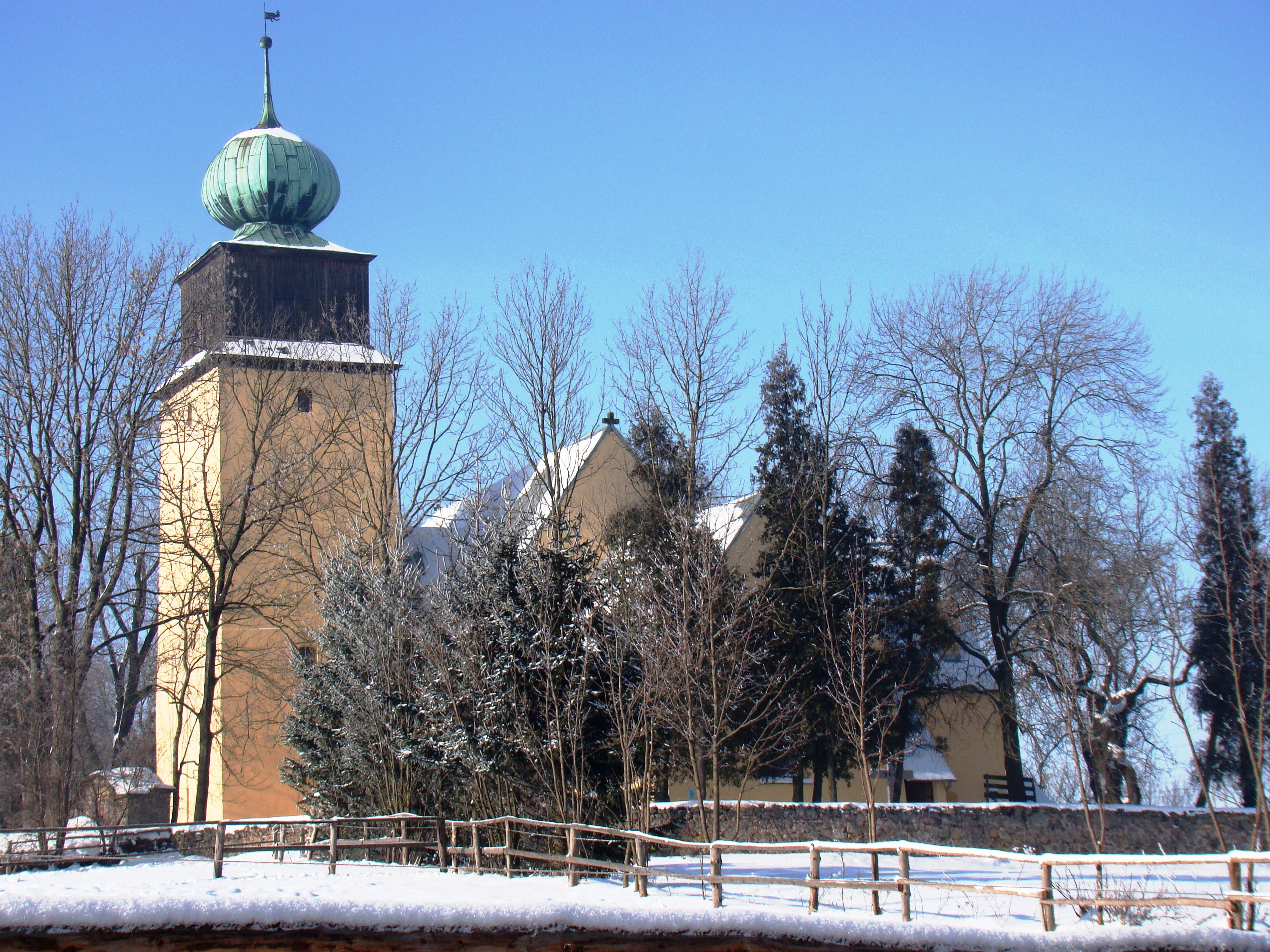 Grzędy - kościół filialny p.w. św. Jadwigi, XIV-XVI (zabytek nr rejestr. A/1715/787 z 26.10.1960)